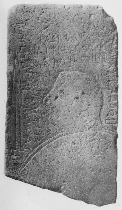 „Stele von Lemnos“, Grabstele aus dem Ort Kaminia auf der Insel Lemnos, heute im Archäologisches Nationalmuseum in Athen, Griechenland